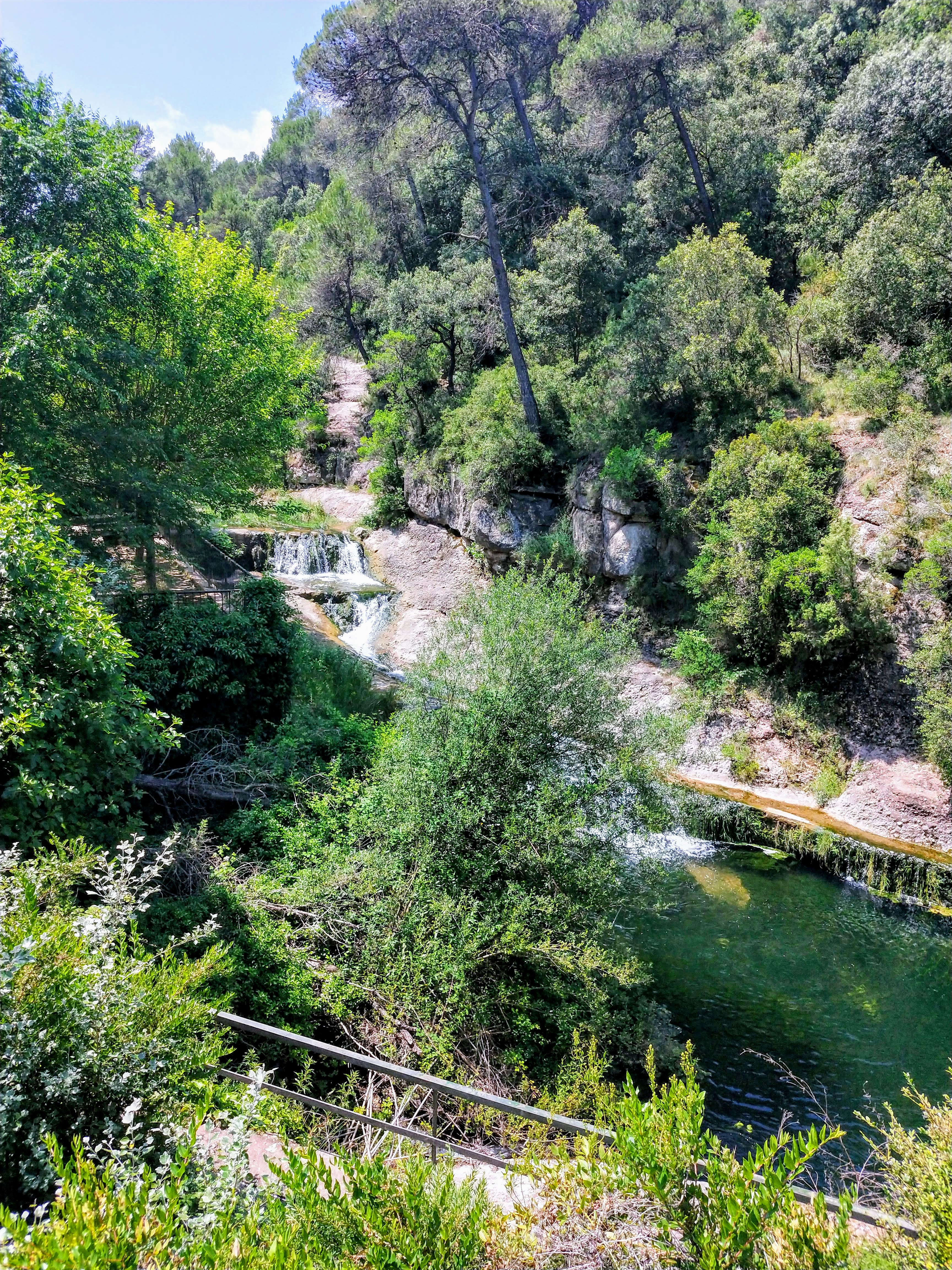 Conocida cascada en la Riera de Rellinars, concretamente en les Fonts, muy cerca del centro del pueblo.